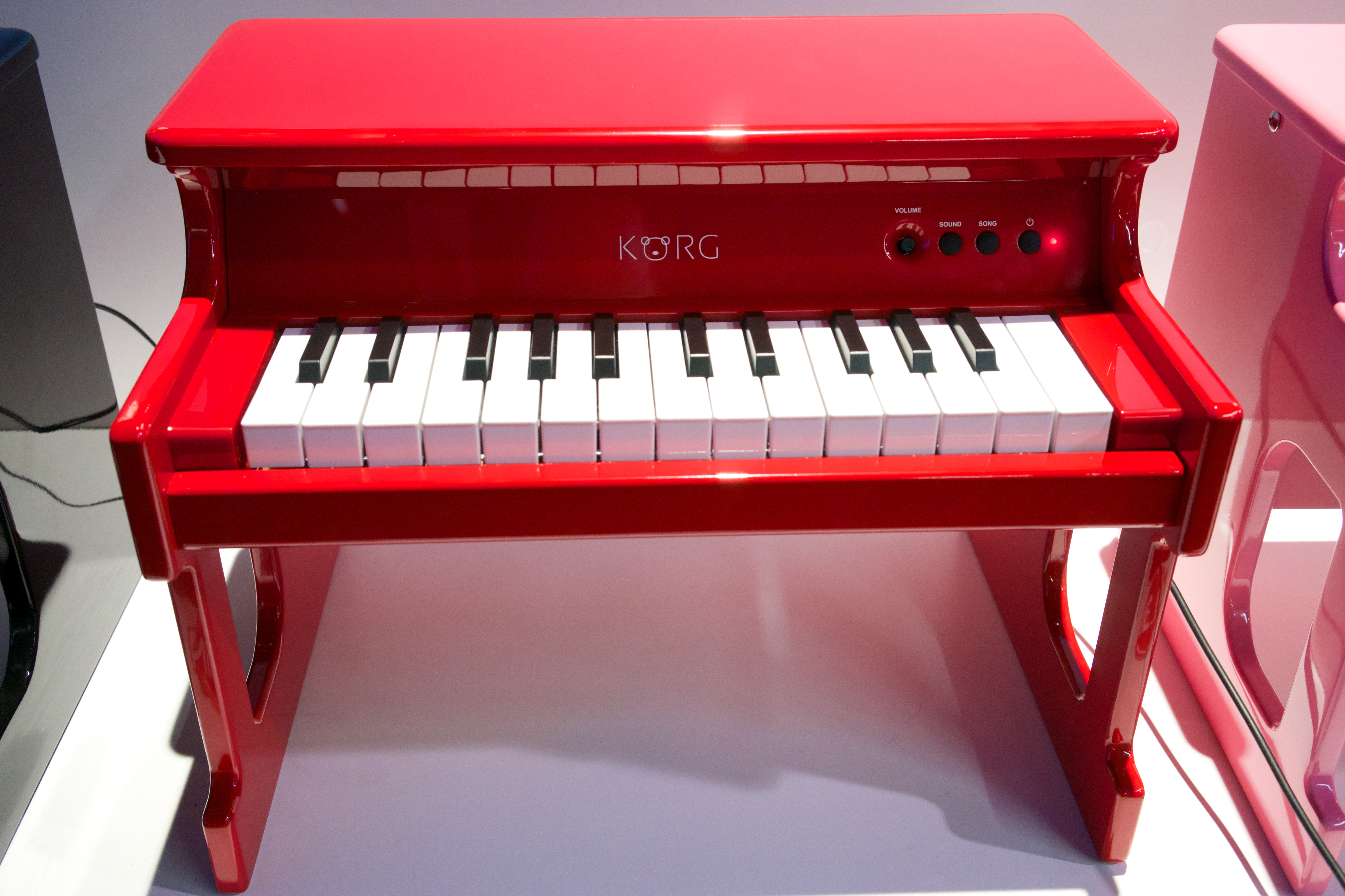 KORG tiny Piano Digital Toy Piano